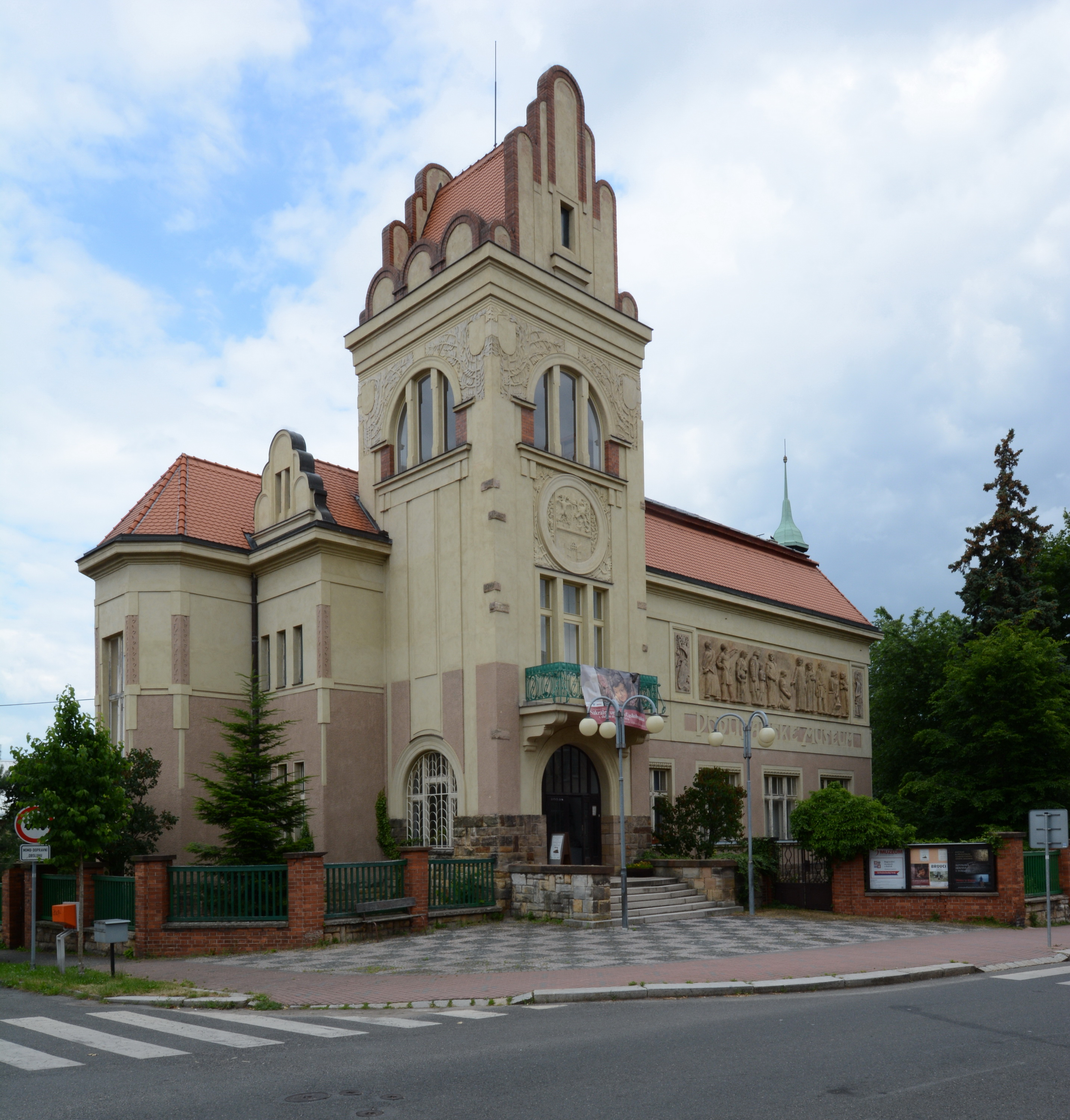 Český Brod, Podlipanské muzeum. Pohled od západu.